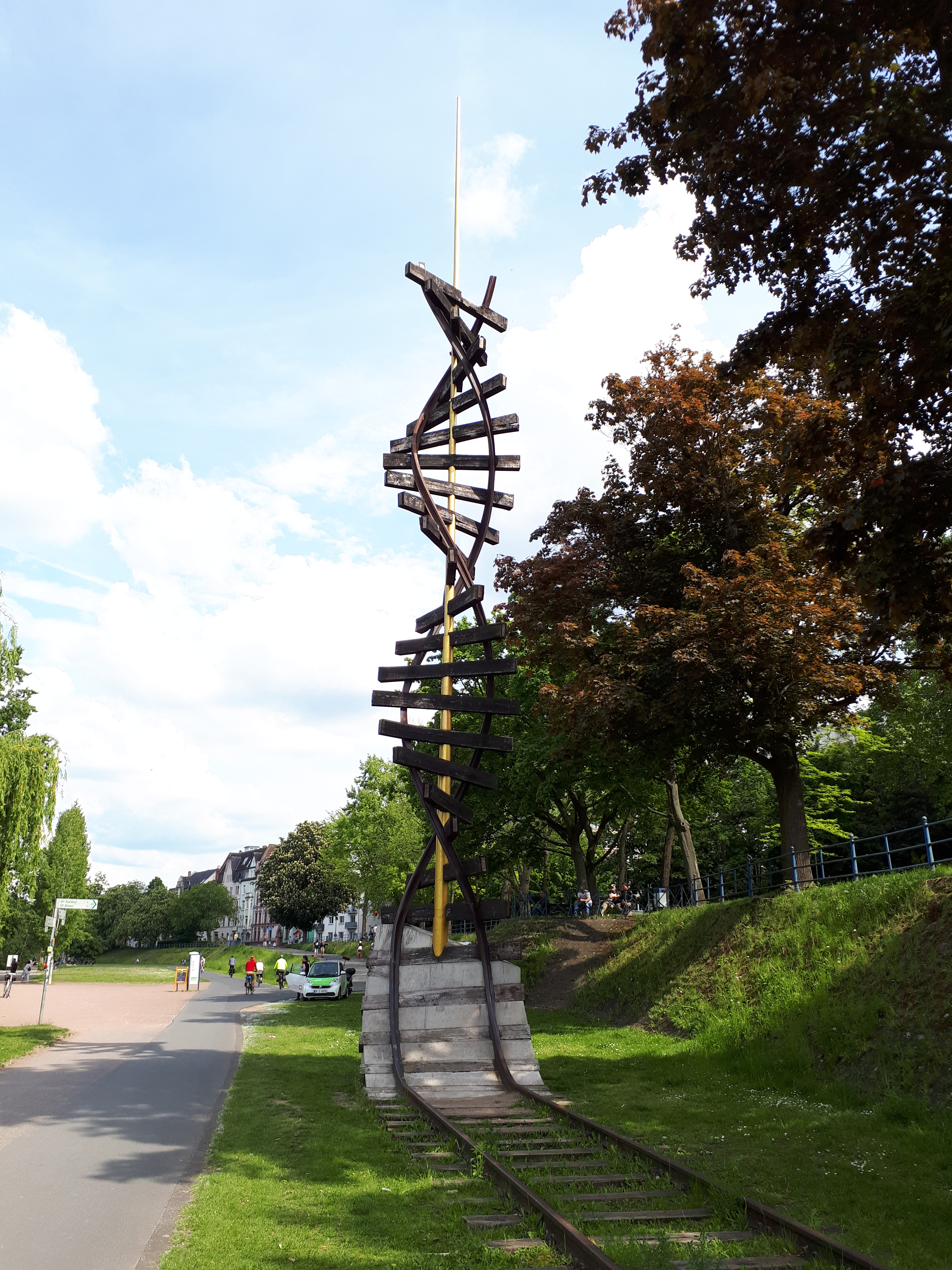 Doppelhelix des Diplom-Designers Frank Flaskämper am Ende des Gleisrests der Hafenbahn Offenbach am Mainufer